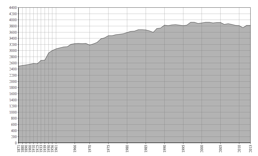 Dieses Bild zeigt die Bevölkerungsstatistik von Durbach